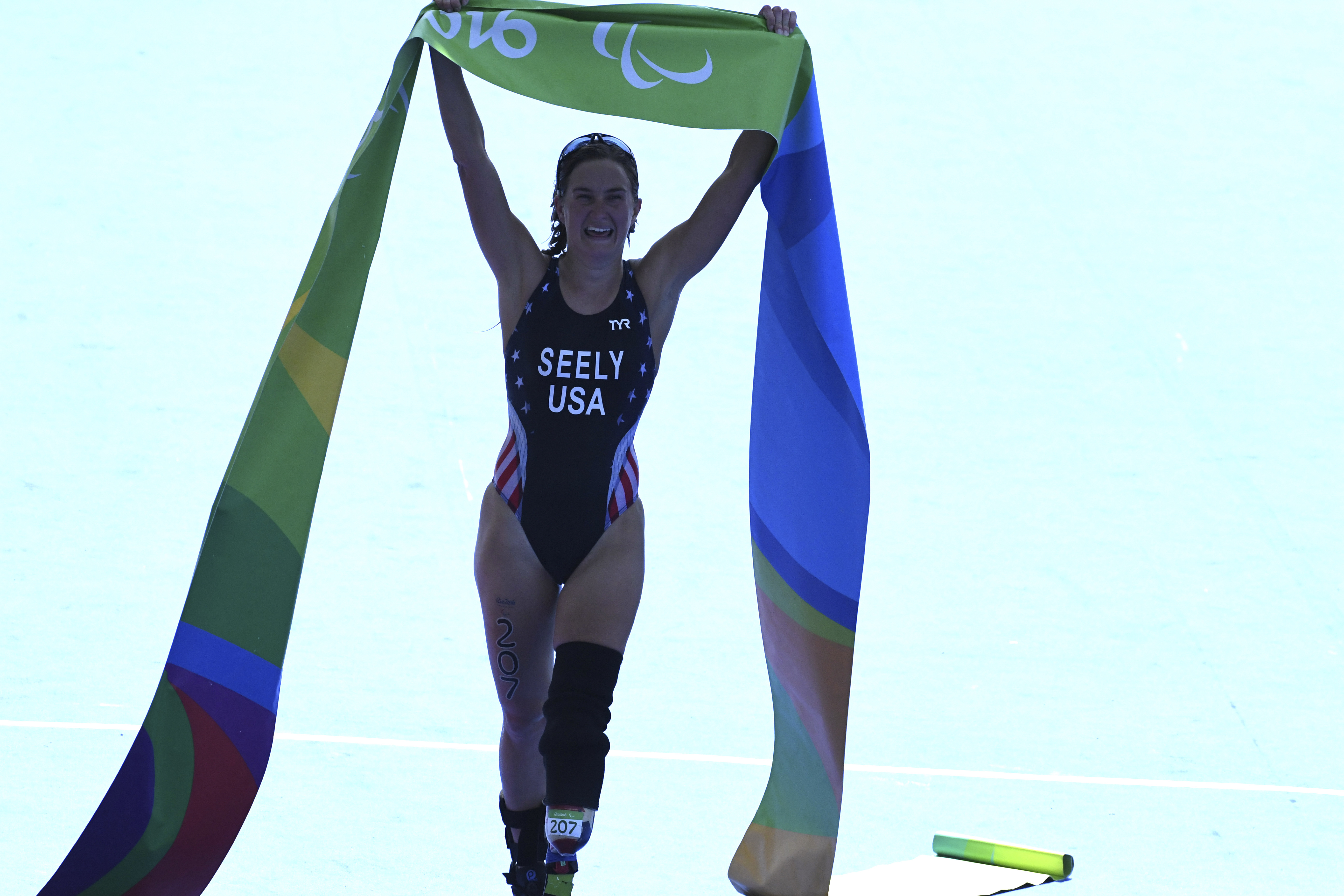 Rio de Janeiro - Bicampeã mundial em 2015/16, a norte-americana americana Allysa Seely chega em primeiro lugar e fica com a medalha de ouro no triatlo feminino PT2 das Paralimpíadas